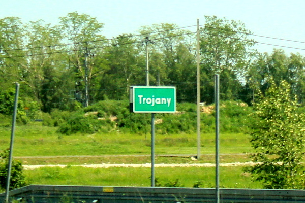 Trojany - wieś w Polsce położona w województwie mazowieckim, w powiecie wołomińskim, w gminie Dąbrówka.